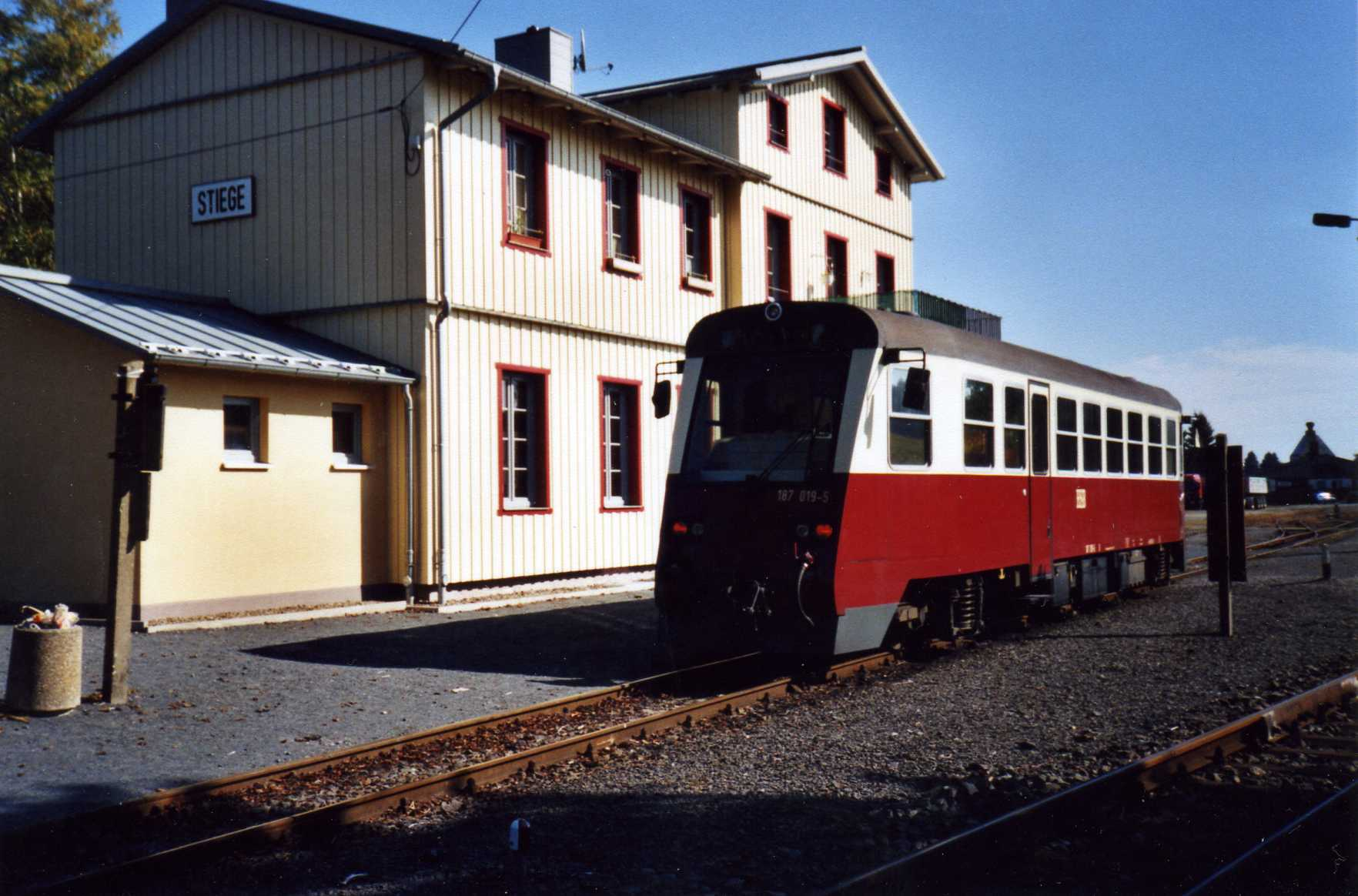 Bahnhof Stiege, Sachsen-Anhalt, Deutschland. HSB 187 019-5